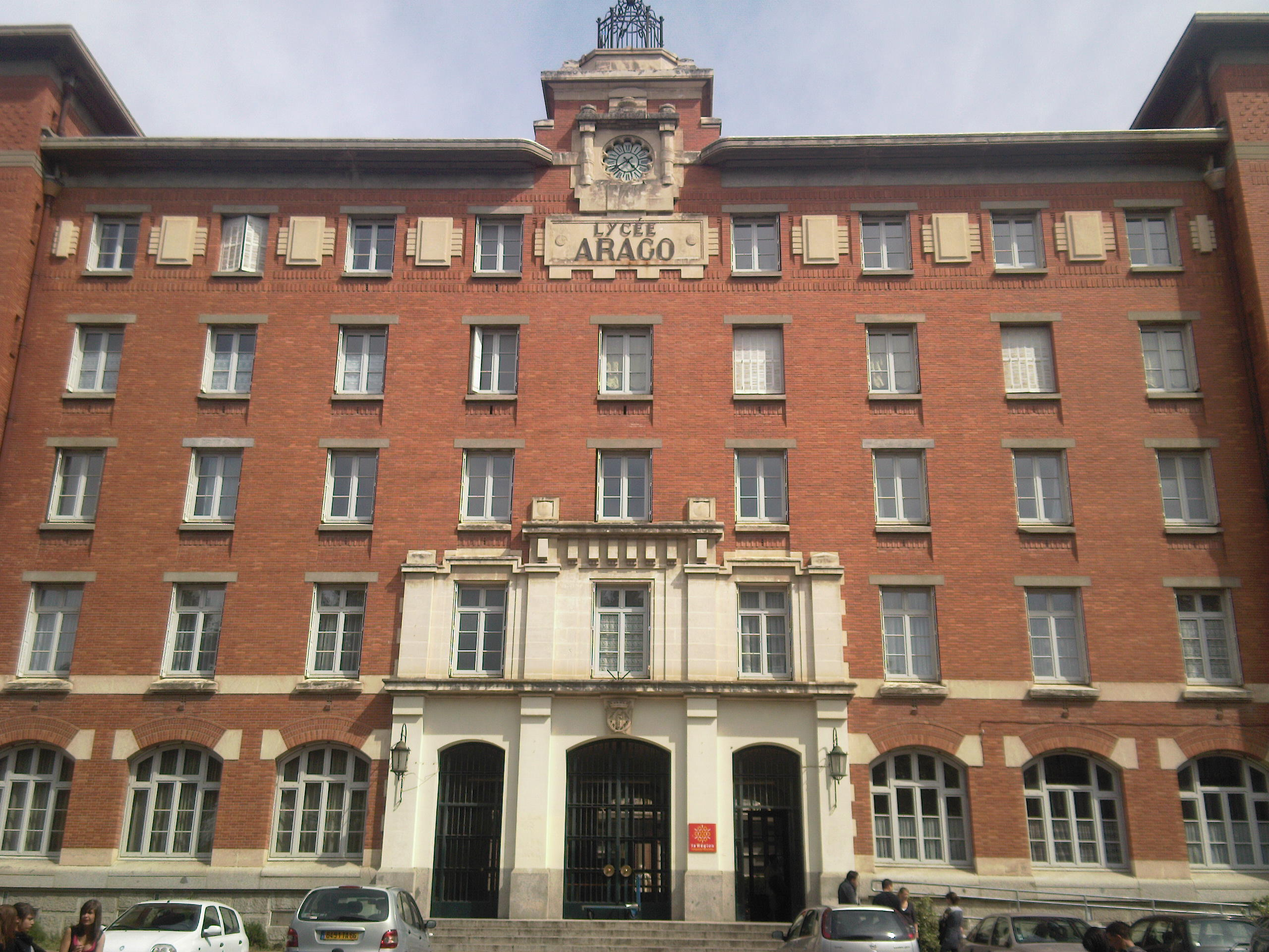 Facade Principale du Lycée François Arago de Perpignan